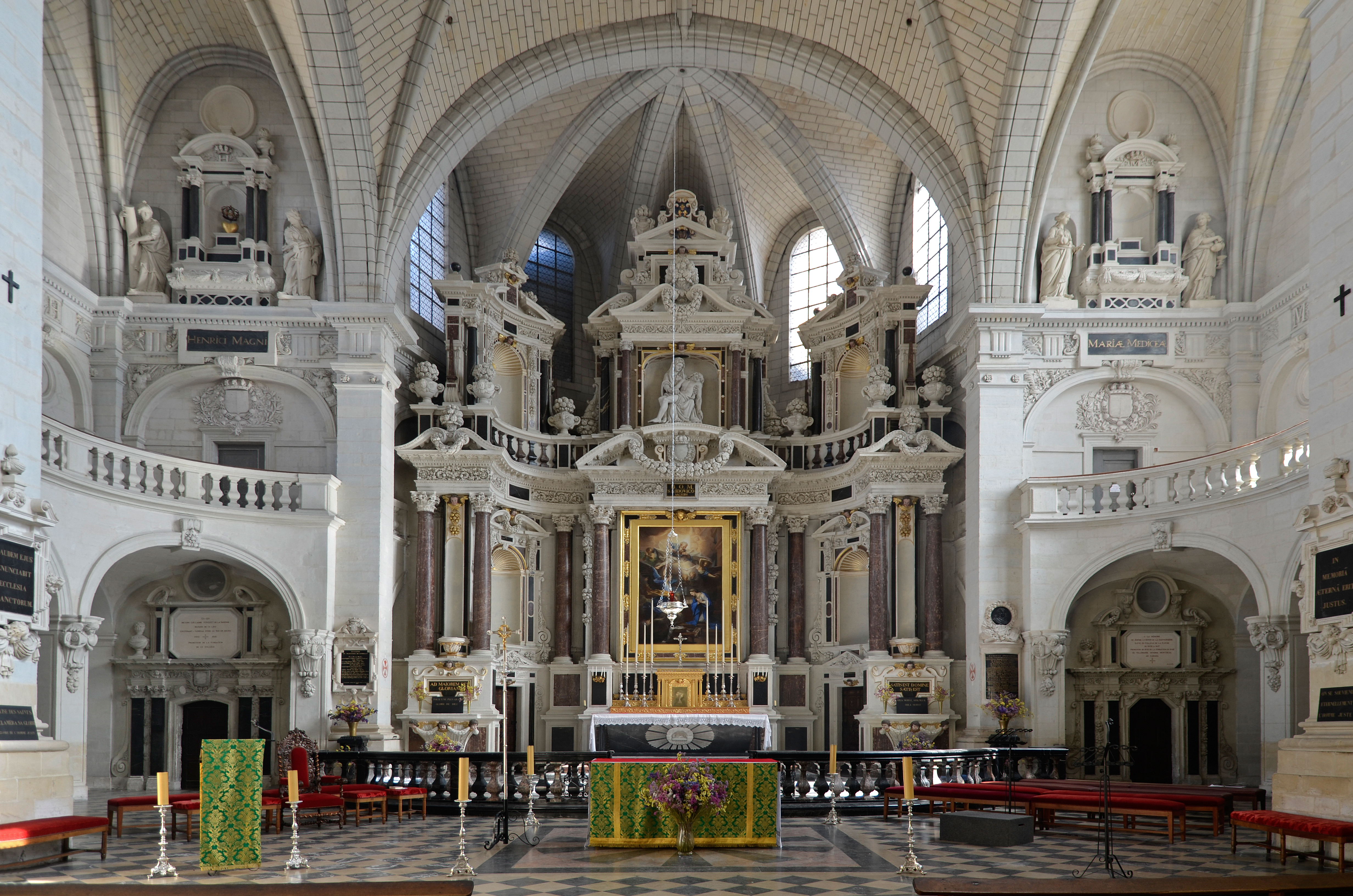 Ancien collège des Jésuites, actuellement Prytanée national militaire - La Flèche (Sarthe) .